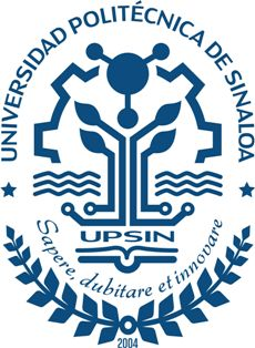 logo upsin